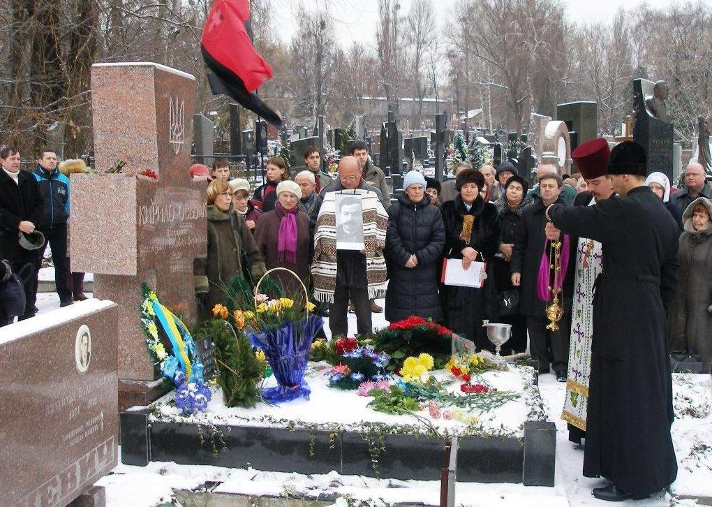 Освячення пам'ятника на могилі Кирила Осьмака (Байкове кладовище, 01.12.2007. Фото Сергія Шевченка)